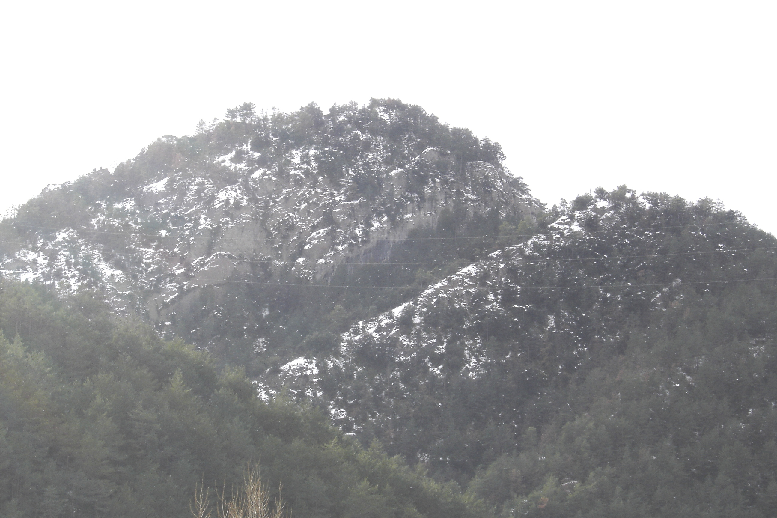 Els Castell (Navès) vist des del NE.